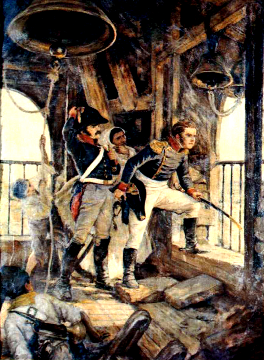 Bernardo O'Higgins, durante la batalla de Rancagua (2 de octubre de 1814), otea desde la torre de la Merced el avance de las tropas del General José Miguel Carrera.